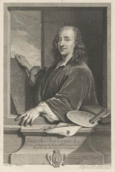 Portrait of Louis Boullogne (1609-1674), French painter